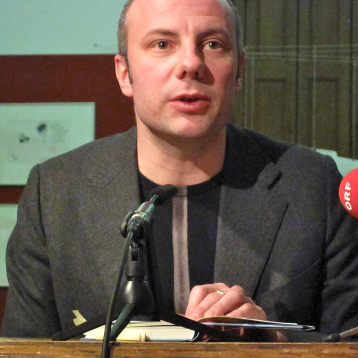 Der Autor liest aus "Standby" im Literaturhaus Graz (gemeinsam mit Petra Ganglbauer).